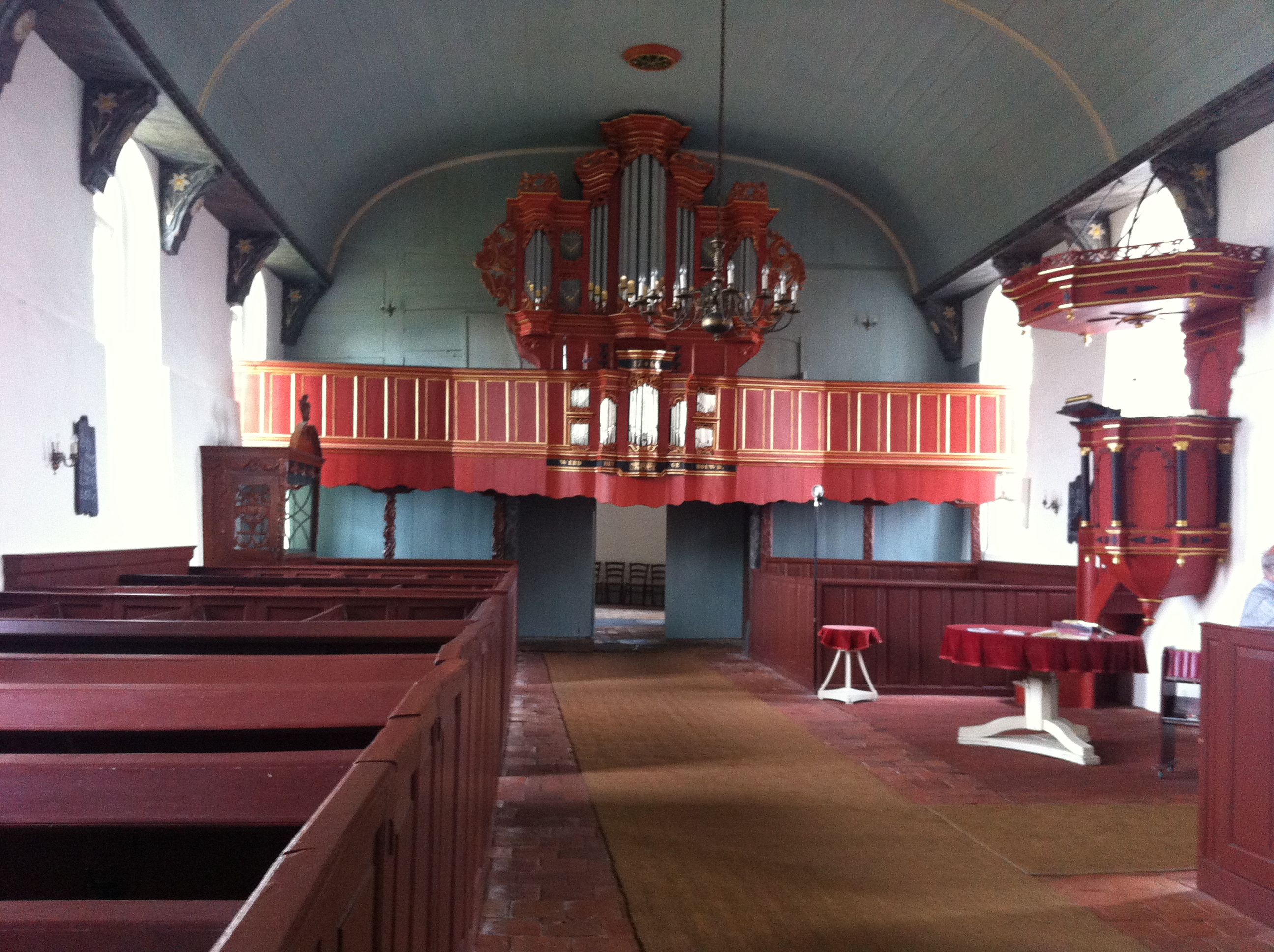 Innenraum der Kirche in Midlum, Rheiderland, Landkreis Leer, Niedersachsen, Deutschland